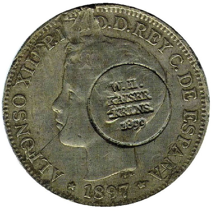 Islas Carolinas moneda con resello conmemorativo de la ocupación alemana.